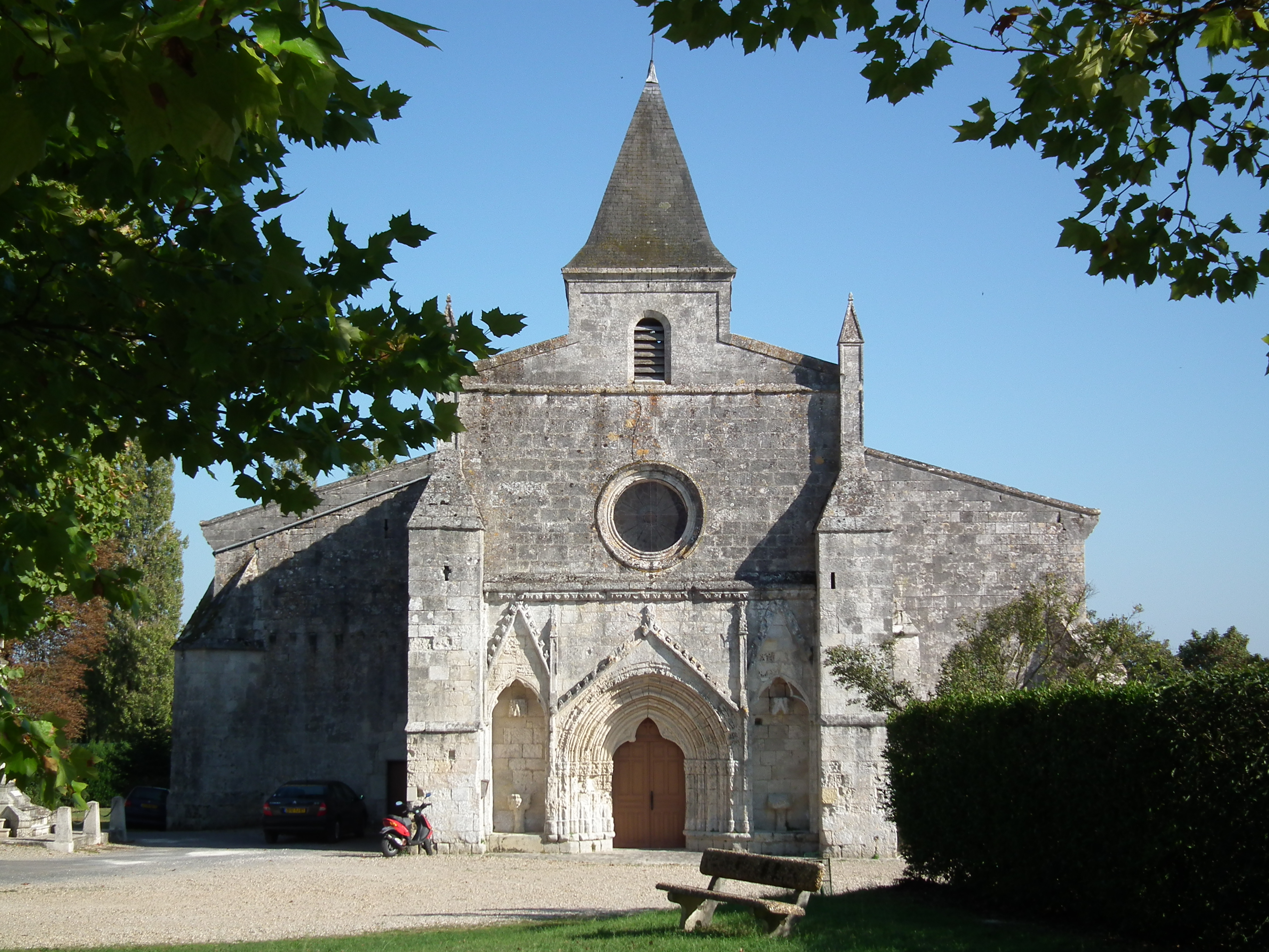 L'église Saint-Michel d'Ozillac